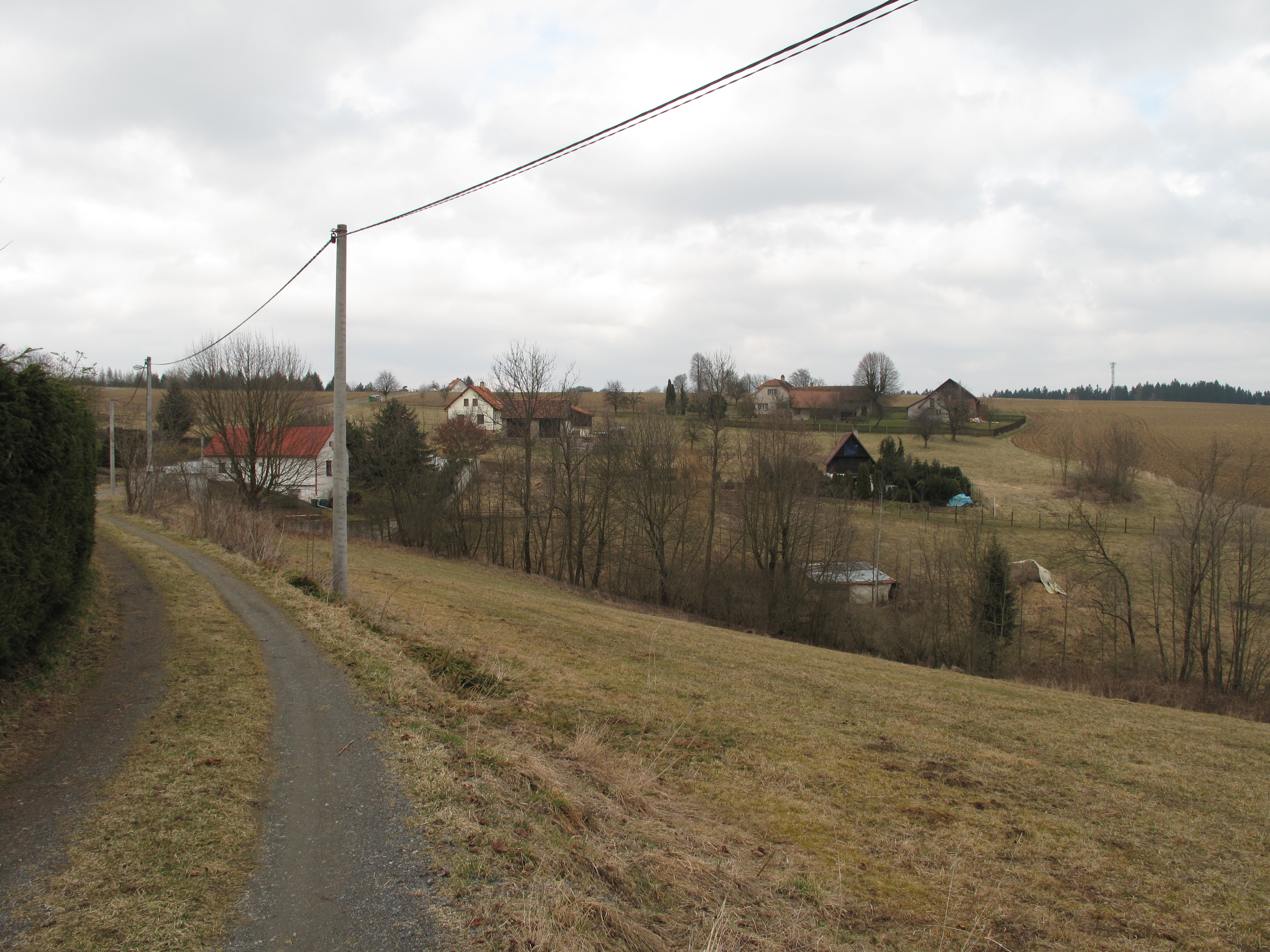 Domy ve Velké Pasece. Okres Havlíčkův Brod, Česká republika.